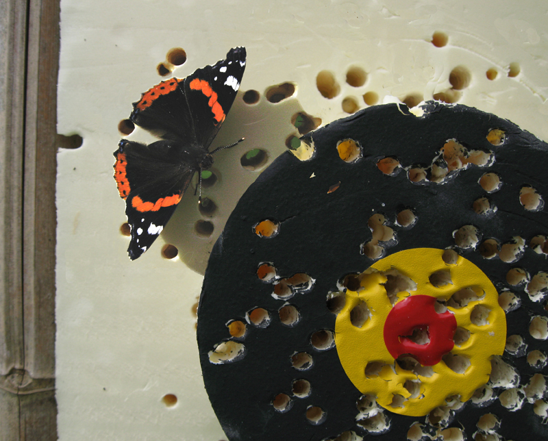 Cible de la Voie du Sarbacana (lâcher-prise et prise de décision ne font plus qu'un)